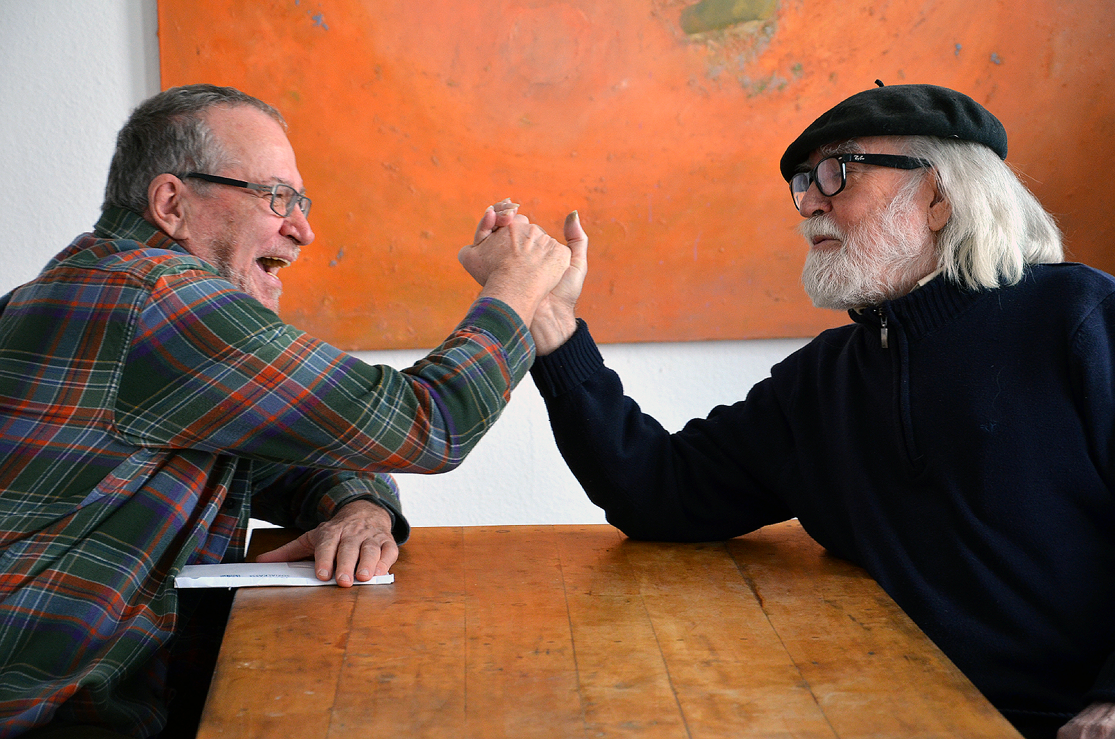 Freude beim Armdrücken: Professor Dr. Peter Hansen (links) und der Bildhauer, Maler und Musiker Jorge La Guardia in der Werkstatt-Galerie für zeitgenössische Kunst" am Engelbosteler Damm 13 in Hannover-Nordstadt